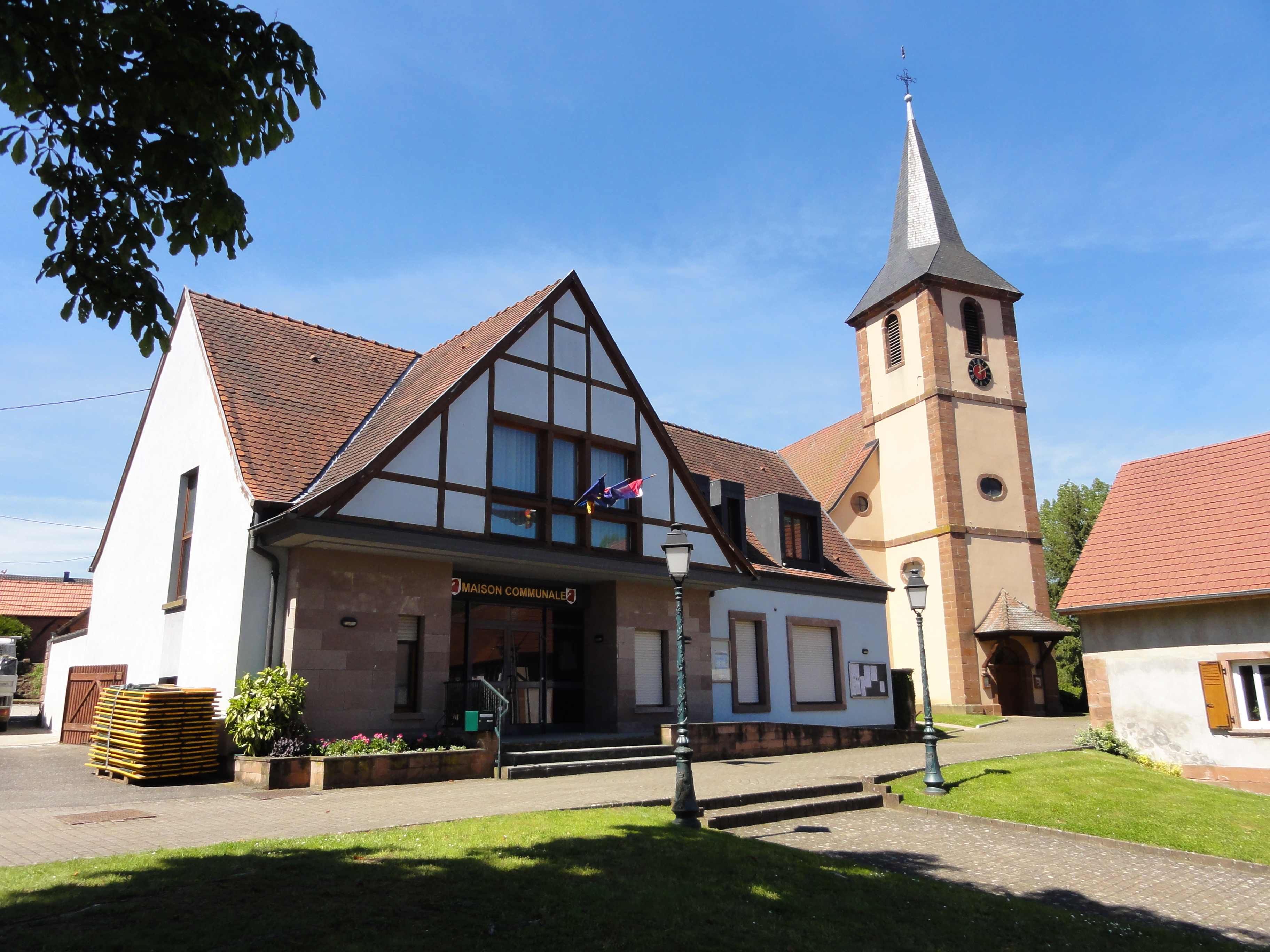 Alsace, Bas-Rhin, Uttwiller, Mairie (XXe), place de la Liberté.